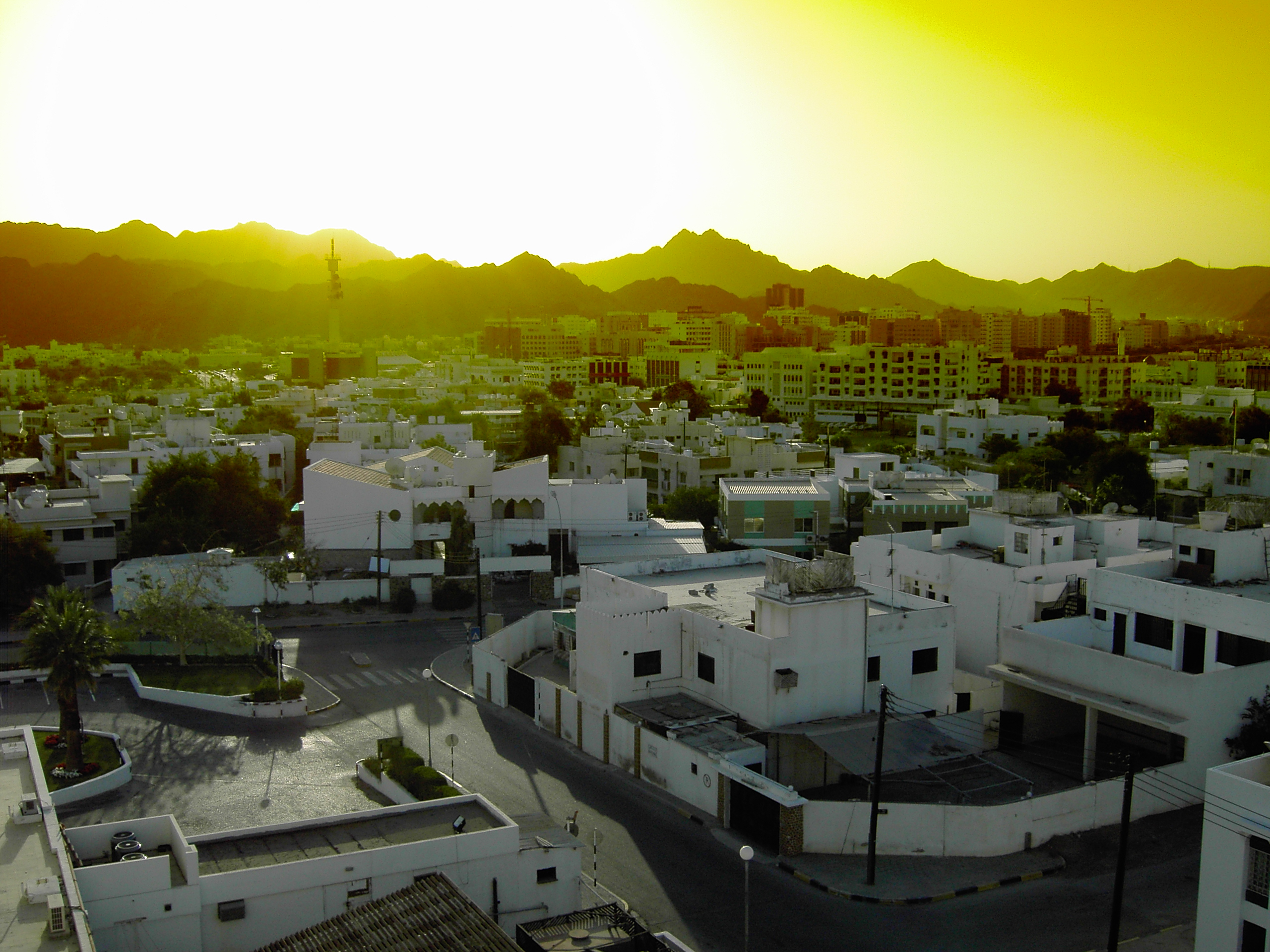 Sonnenaufgang im Stadtteil Al-Ruwi der omanischen Hauptstadt Maskat.